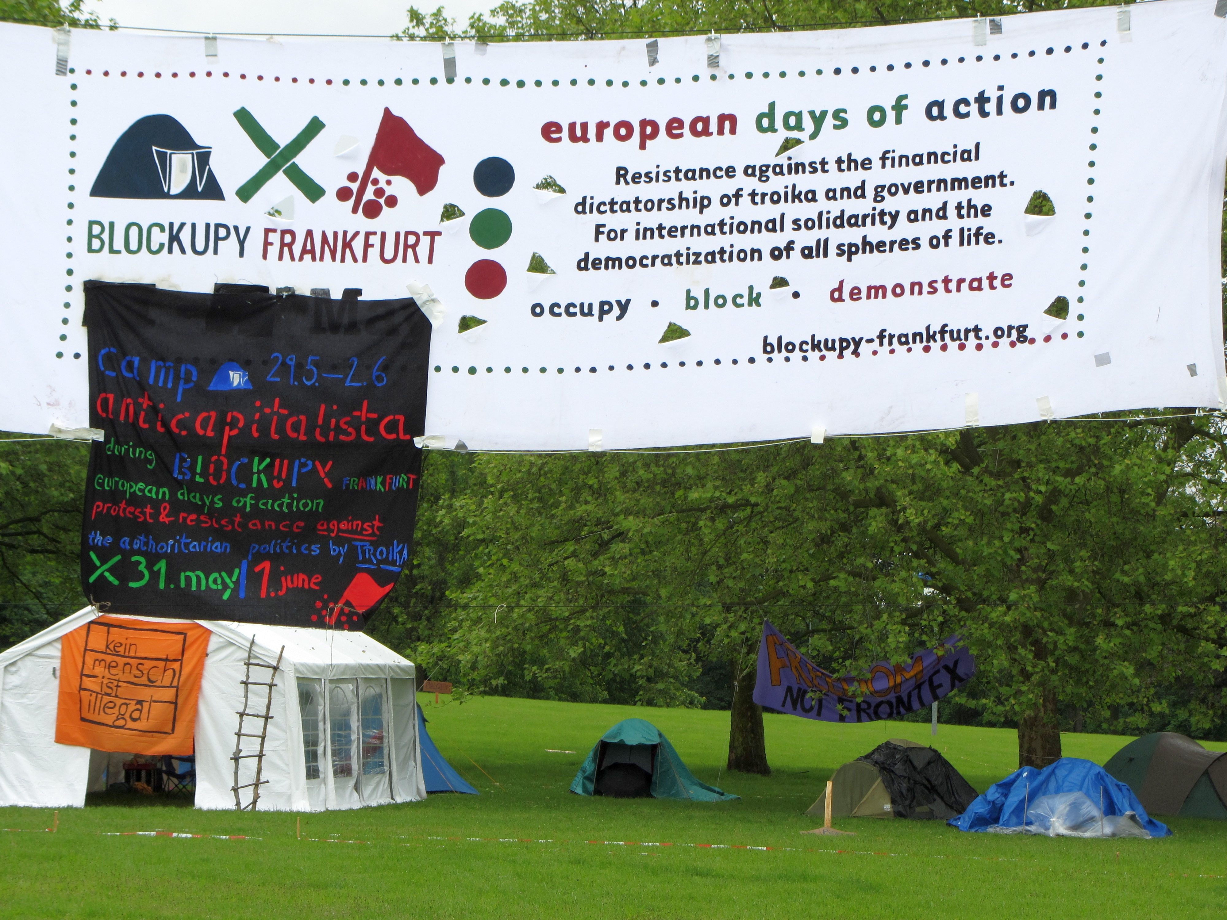 Transparente beim Blockupy-Aktionscamp 2013 in Frankfurt am Main, Rebstockgelände